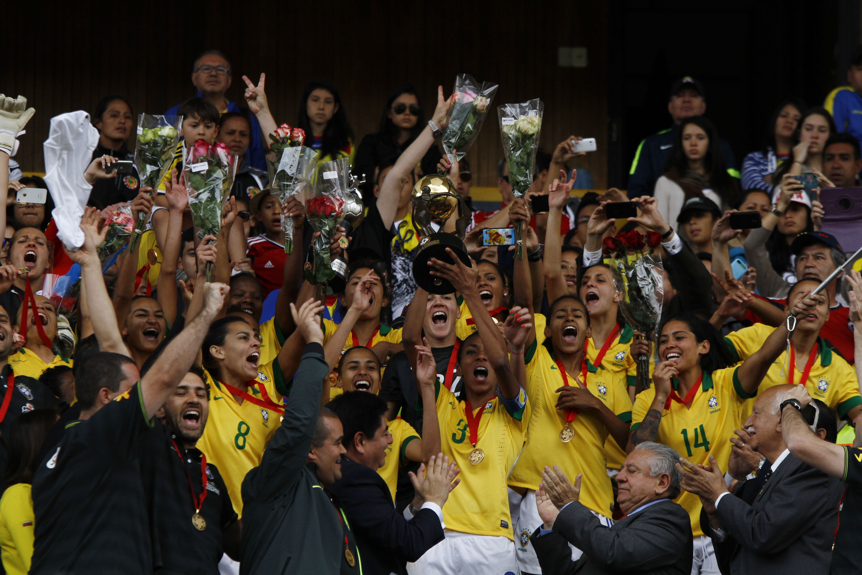 Quito, 28 sep (Andes).- La selección brasileña femenina de fútbol se proclamó Campeona de la Copa América de Fútbol Ecuador 2014. Foto: Micaela Ayala V./Andes